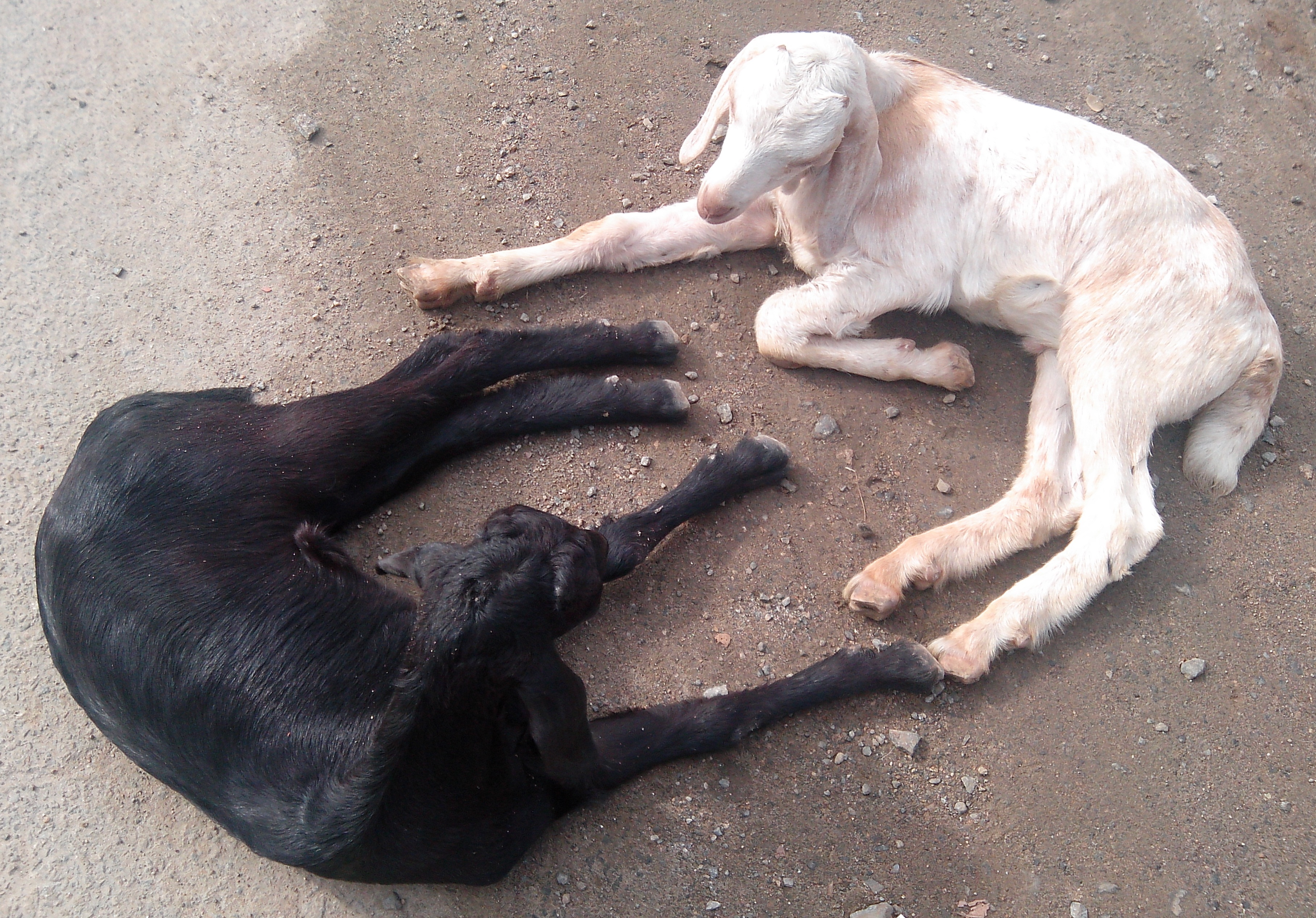 ஆடுகள்.சேலம், தமிழ்நாடு, இந்திய ஒன்றியம்.